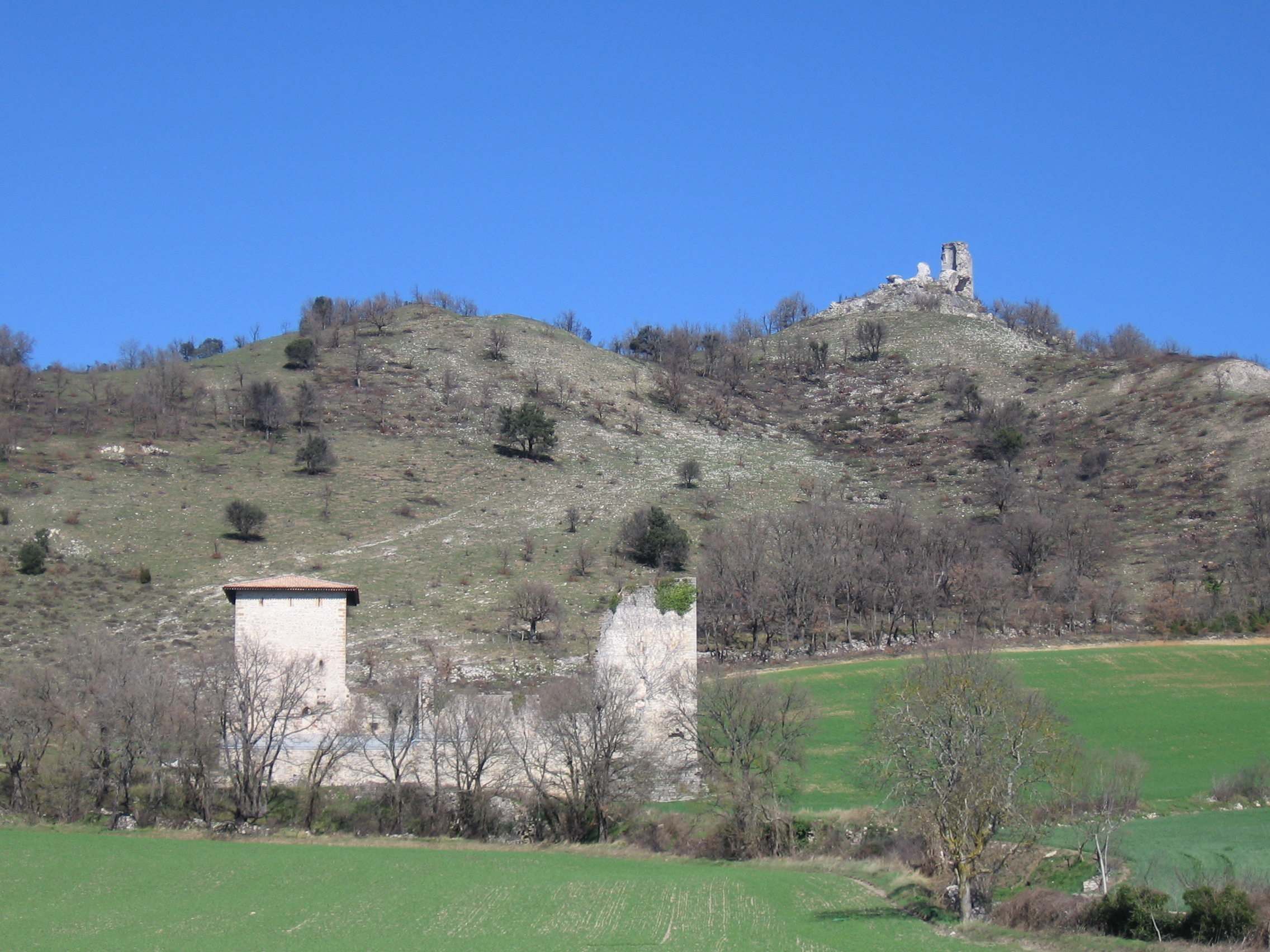 Palacio y restos del castillo de Guevara